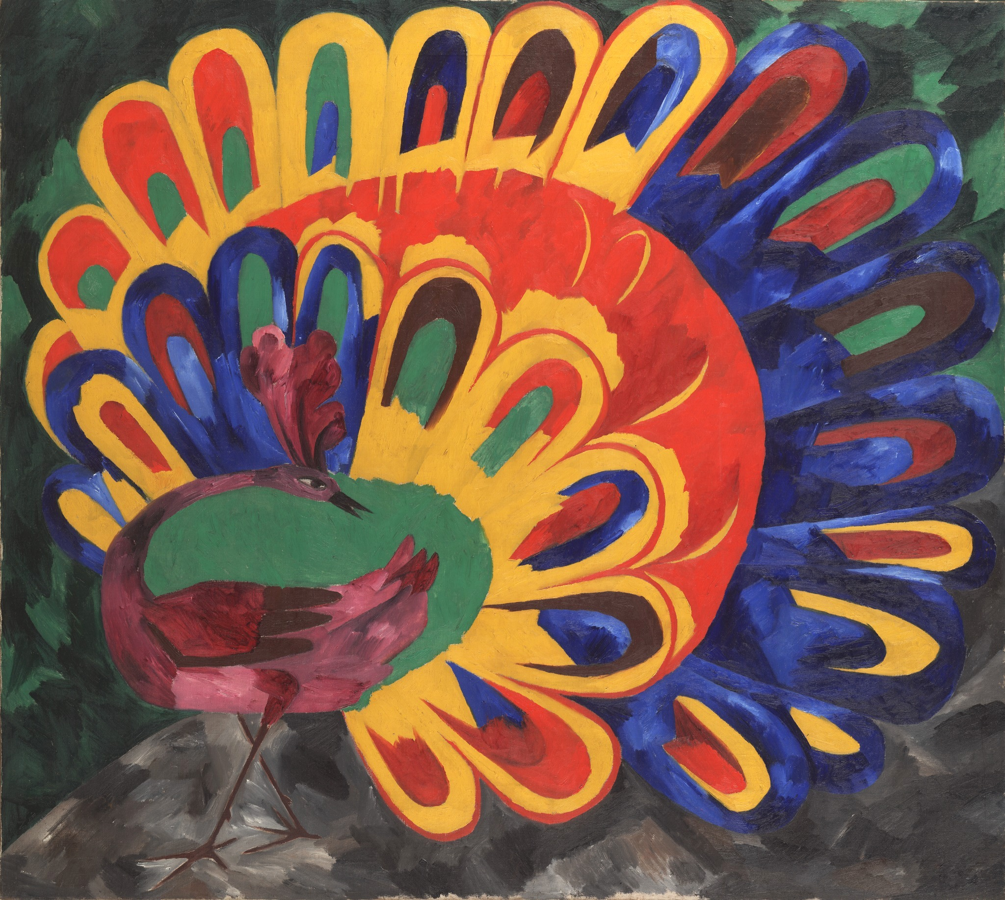 Гончарова, Наталья Сергеевна "Павлин под ярким солнцем (стиль египетский)". 1911. Холст, масло. 129x144. Государственная Третьяковская галерея